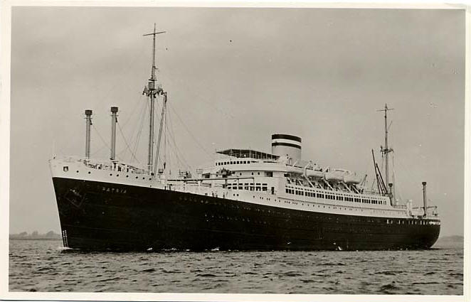 Patria im Jahre 1939